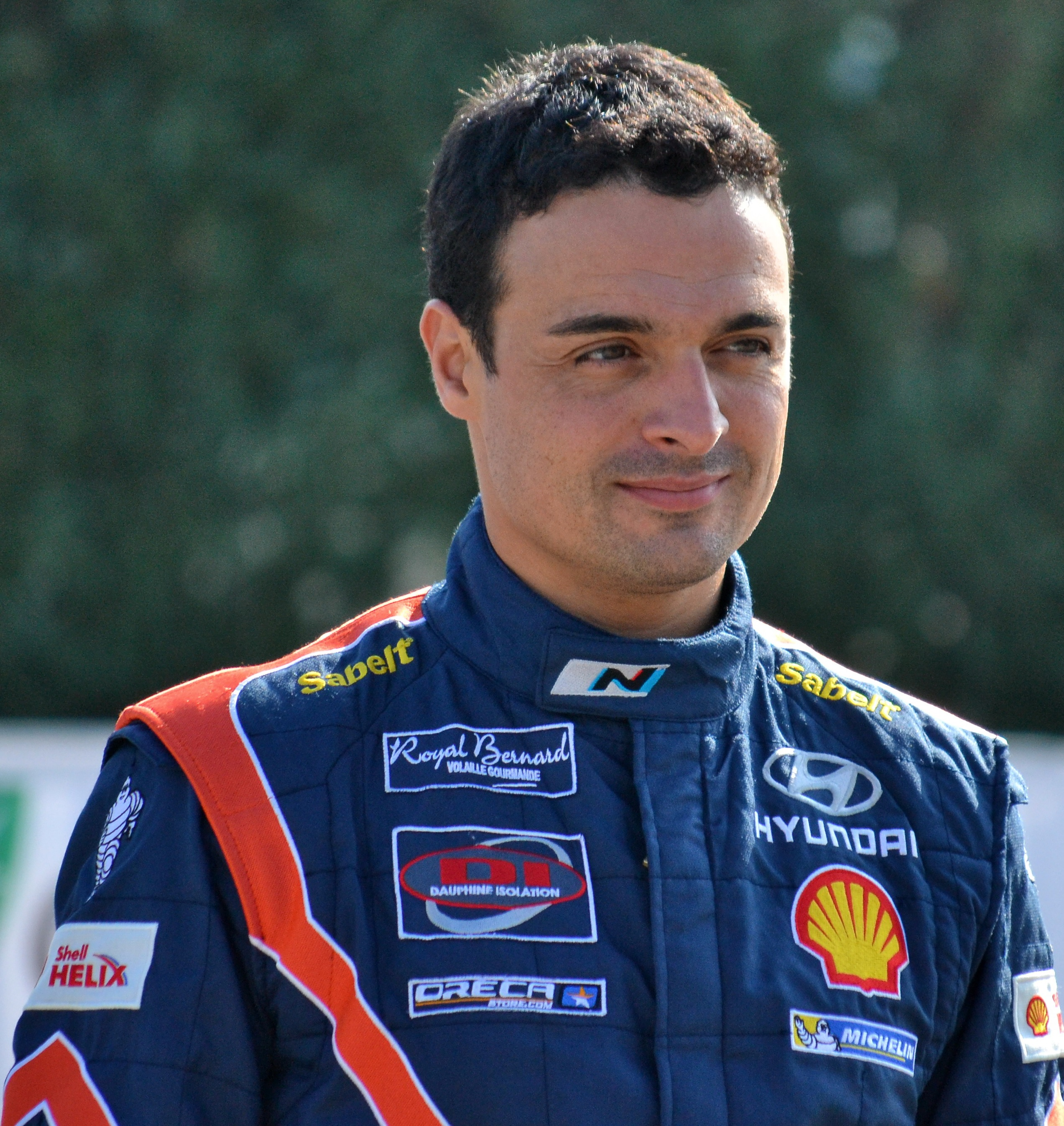 Bryan Bouffier au parc d'assistance de Colmar durant le Rallye de France-Alsace 2014.